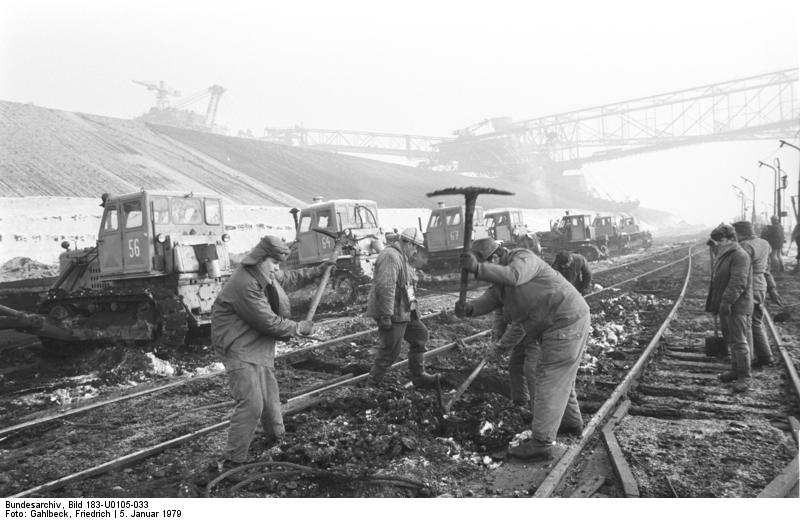 ADN-ZB/Gahlbeck/5.1.79 / Bez. Leipzig: Einen großen Kraft- und Arbeitsaufwand erfordert das Rücken des Weichenpostens 47 im Kohleflöz des Tagebaus Espenhain, um den Baggern 555 und 544 den Weg zur Kohle freizumachen. Zum Wochenende wollen die Kumpel mit Unterstützung von Angehörigen der bewaffneten Organe die volle Versorung des Kraftwerkes Thierbach sichern. Pro Tag wollen sie 35.000 Tonnen Rohkohle liefern.